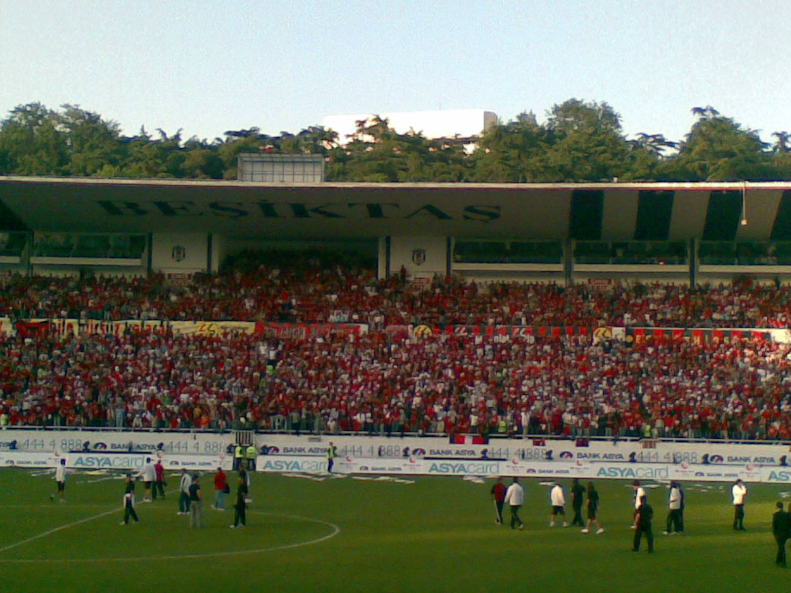 Kendi çektiğim resimdir.